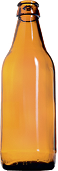 Lasipullo